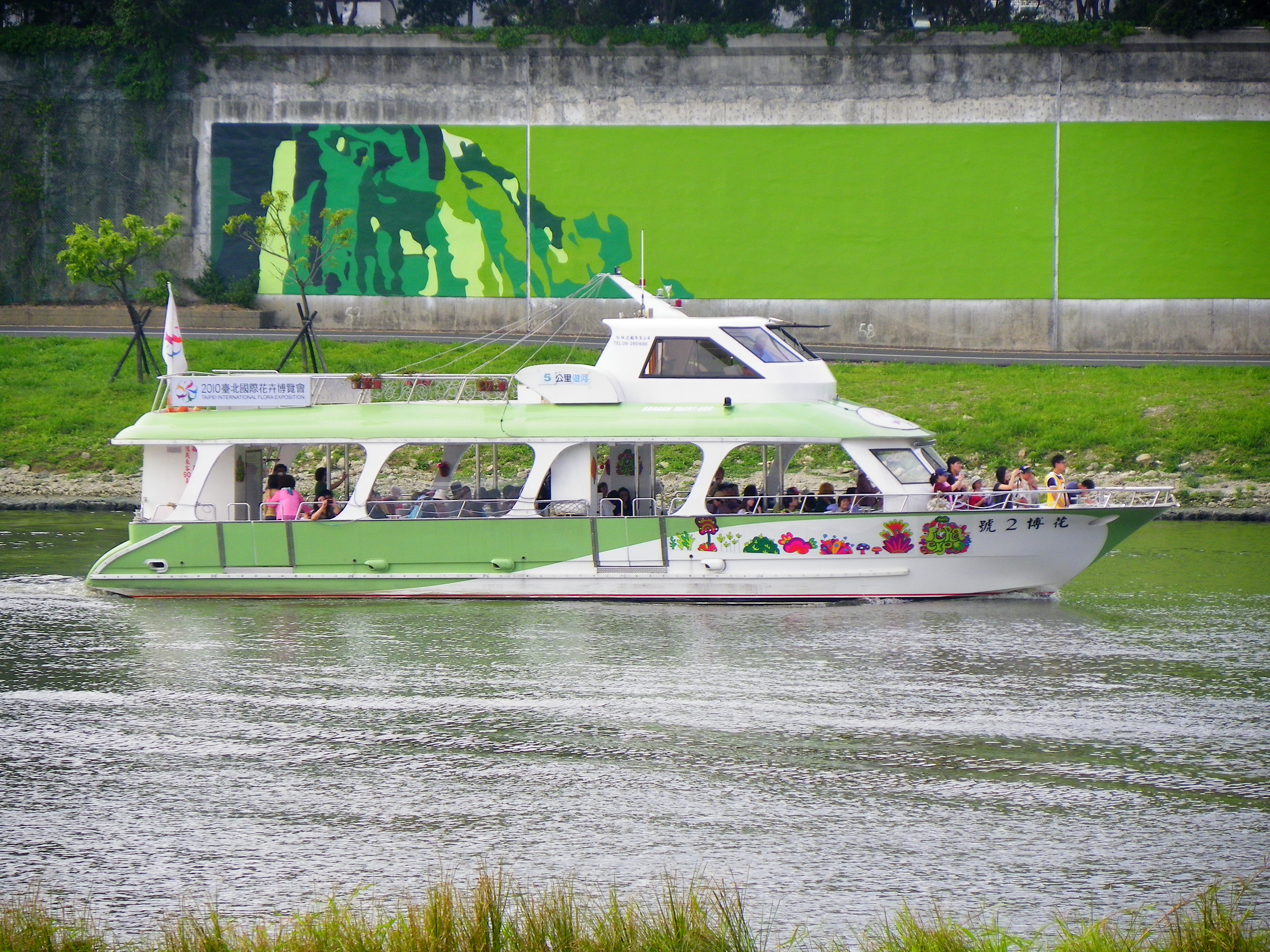 中文（台灣）: 行駛大佳～圓山間，即將返回大佳碼頭的花博2號遊艇。